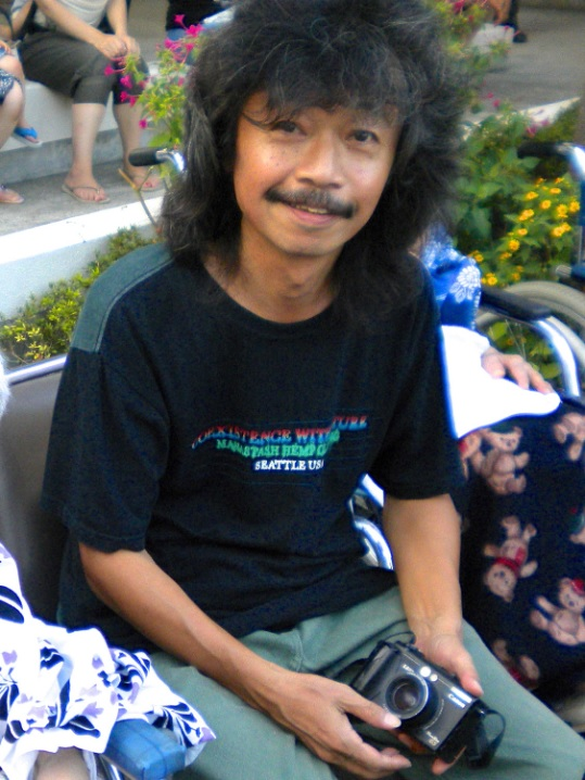 小川銀次 001